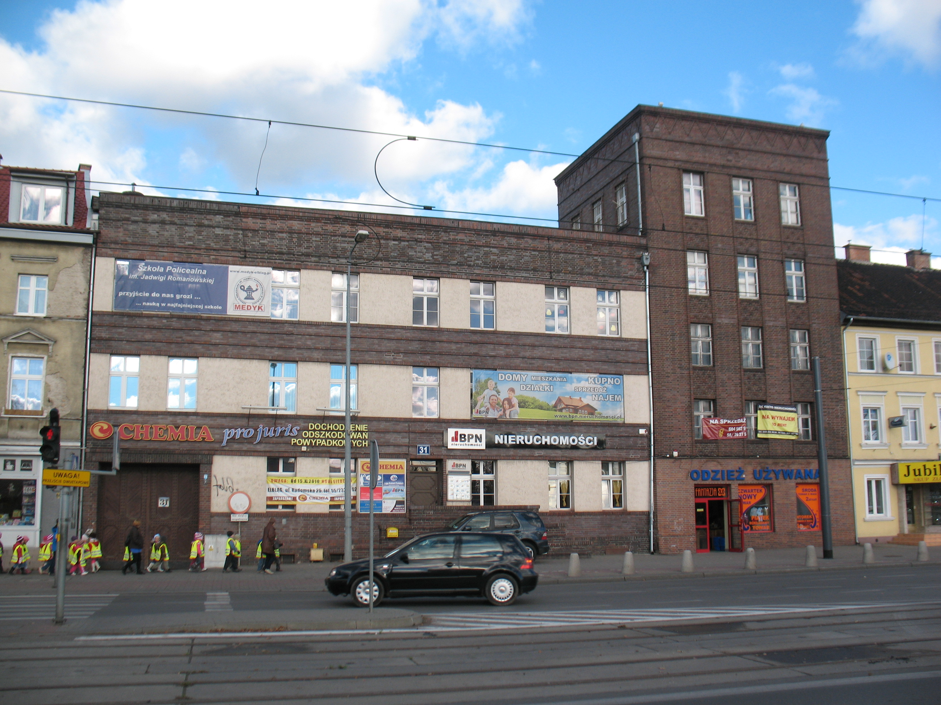 Elbląg, Aleja Grunwaldzka 31 - dom, po 1930